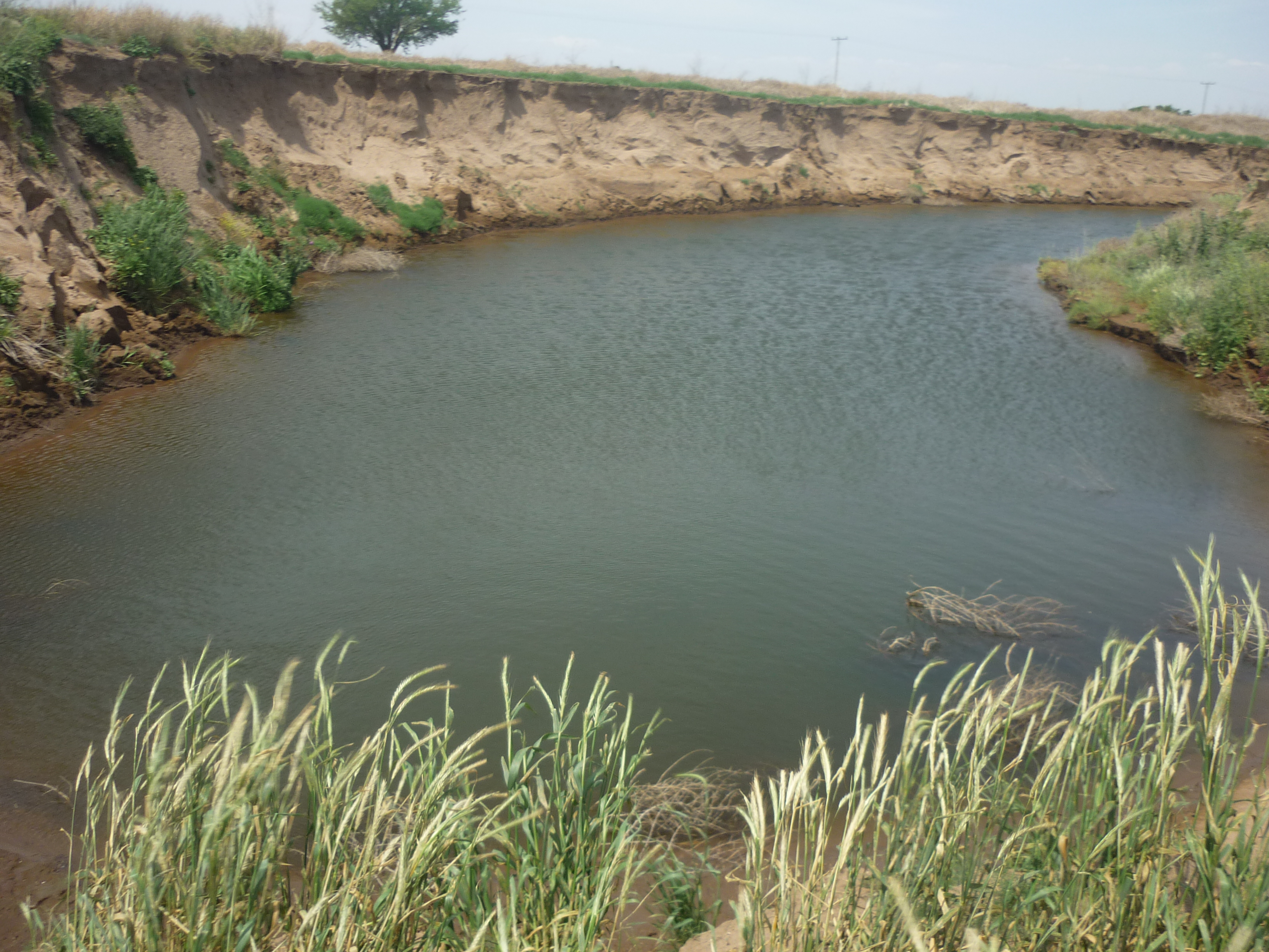 En la foto se ve una de las tres nacientes del Rio Nuevo